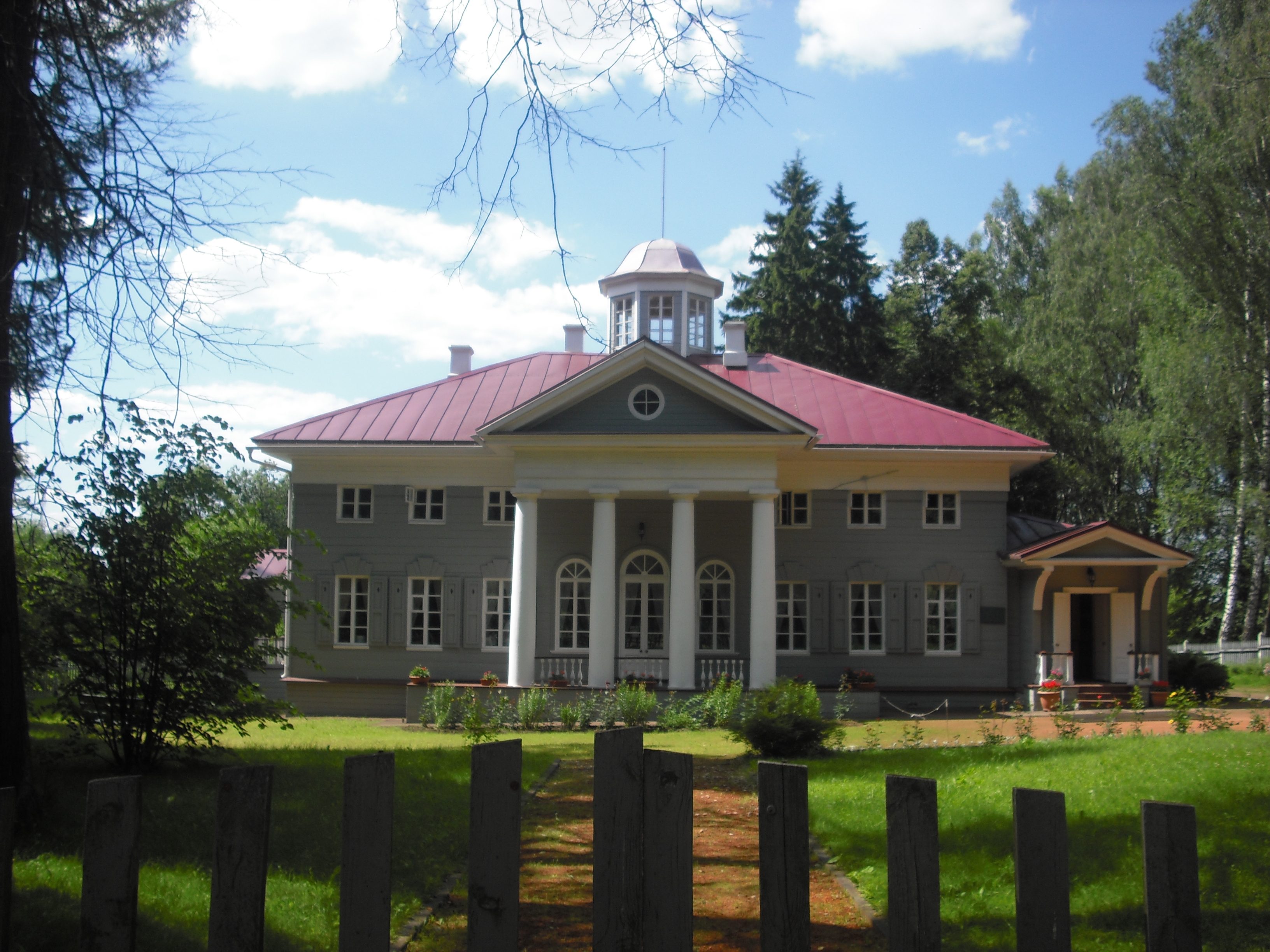 Дом-музей А.С. Пушкина в Захарово, Московская область